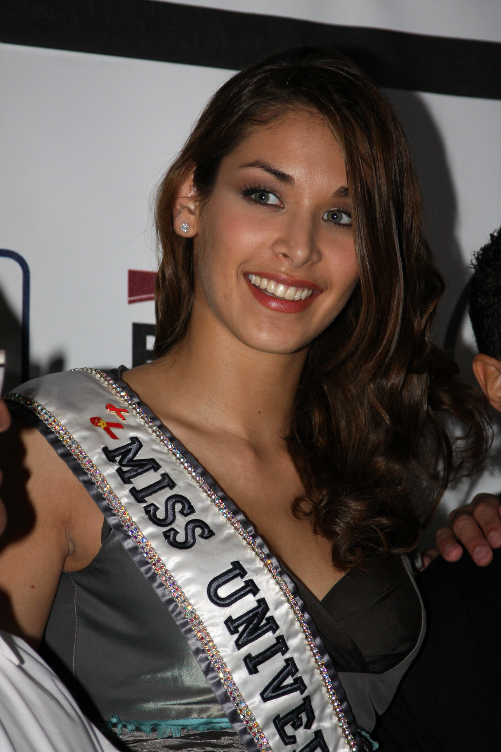 Miss Universe 2009 Dayana Mendoza en Managua, Nicaragua, apoyando la campaña de PASMO "Y vos, como te cuidás del SIDA"